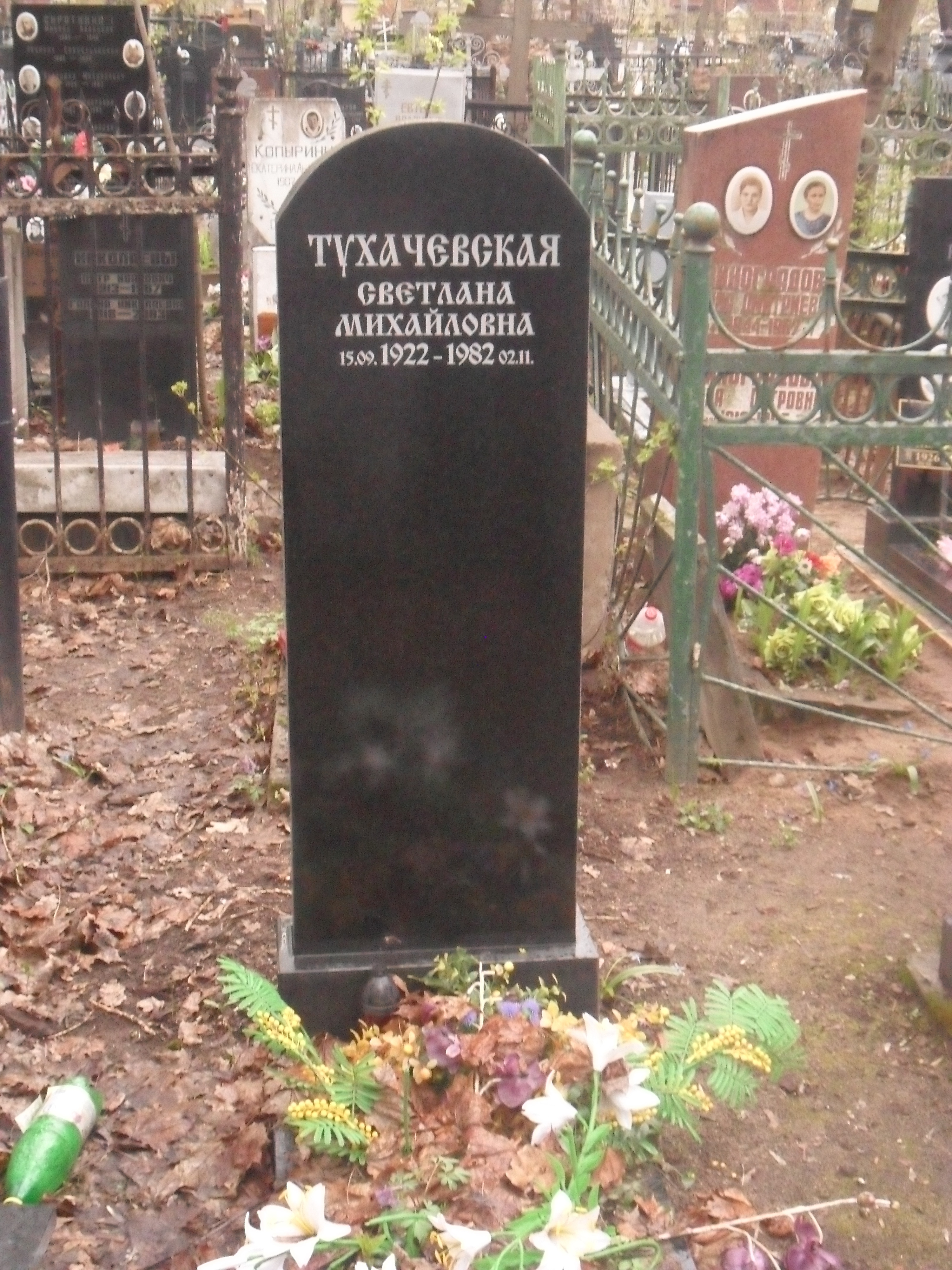 Могила Светланы Тухачевской, дочери репрессированного Маршала Советского Союза Михаила Тухачевского.